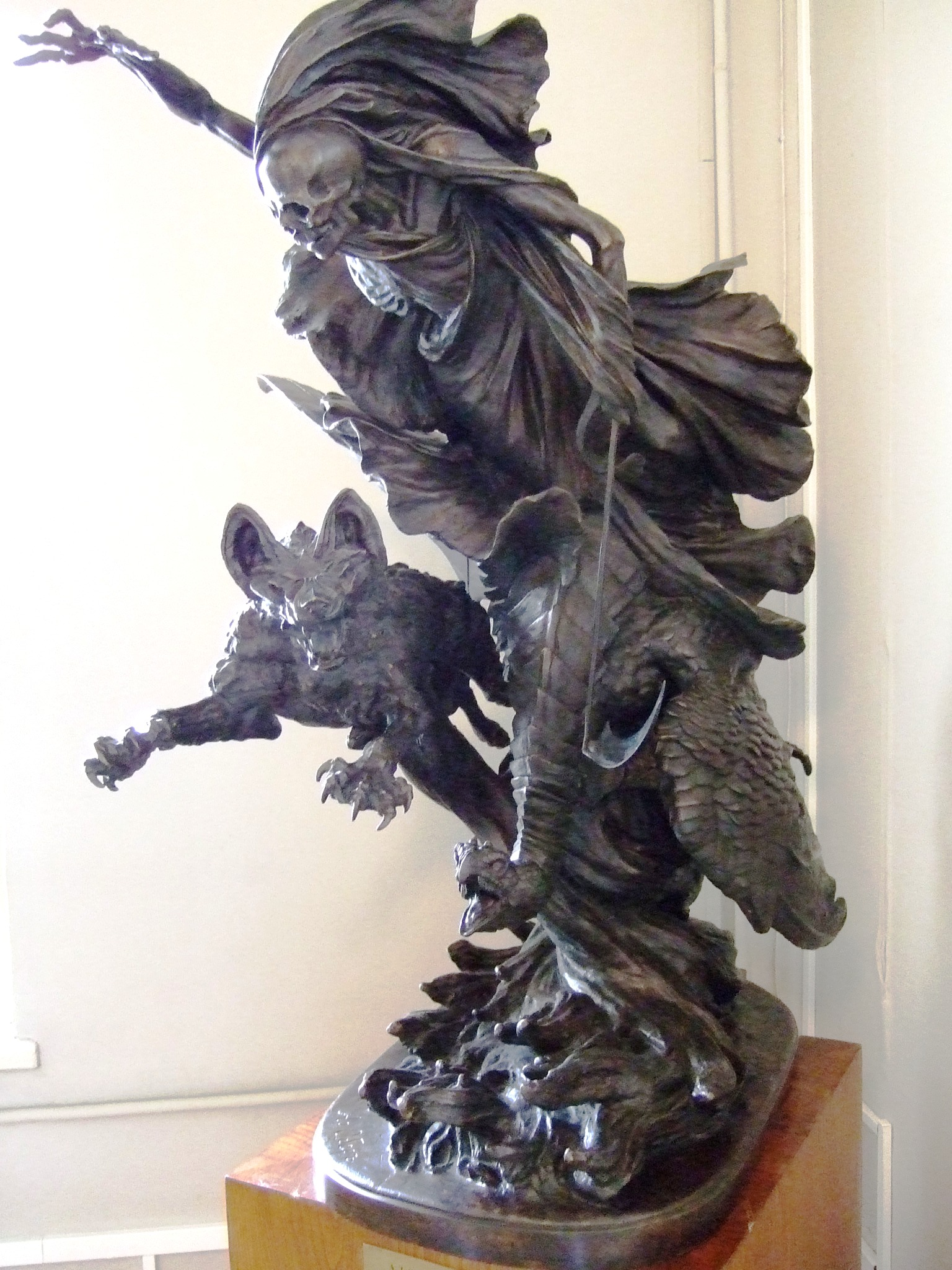 Calamity